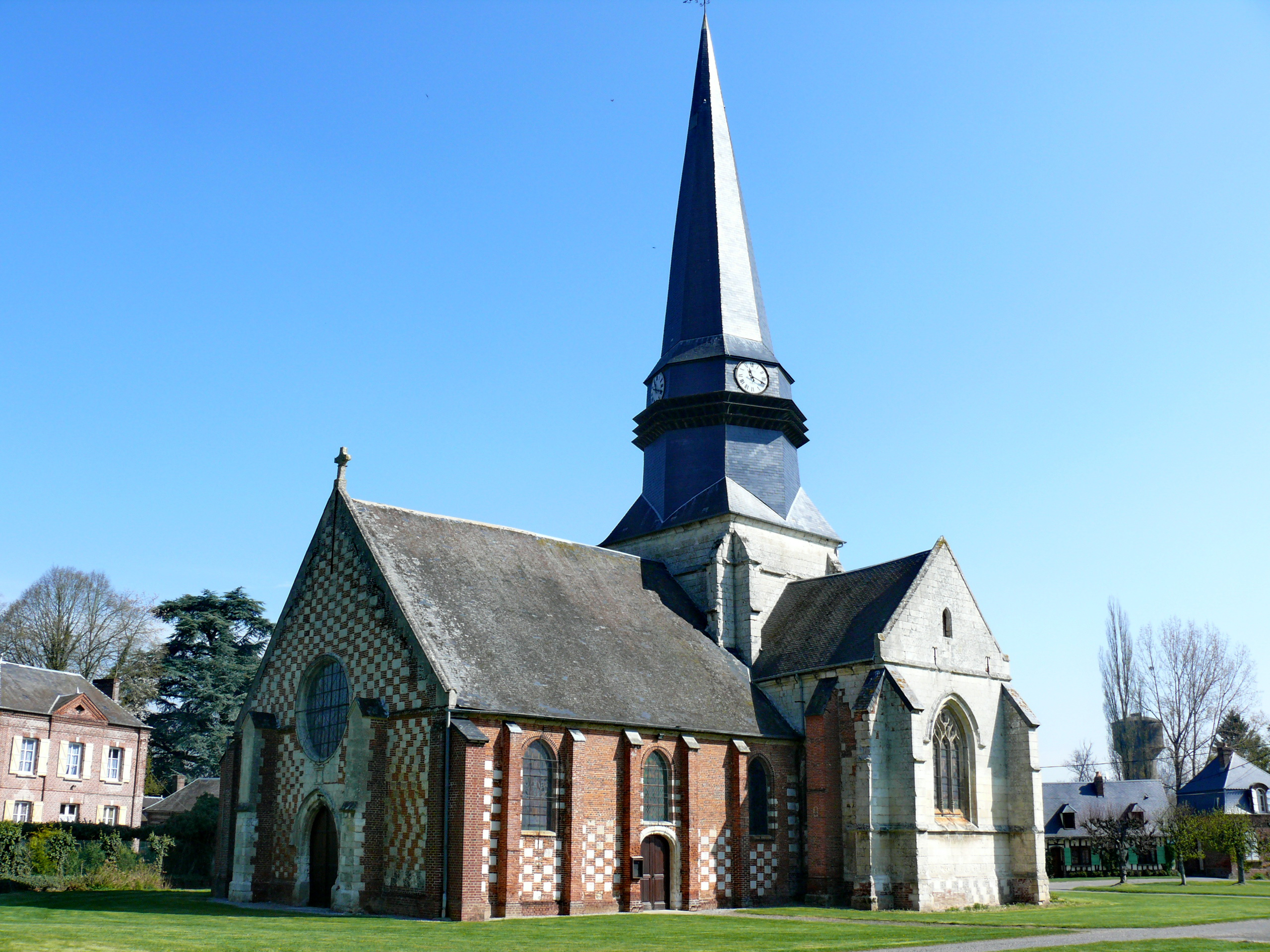 SARCUS : Eglise Saint-Pierre et Saint-Paul